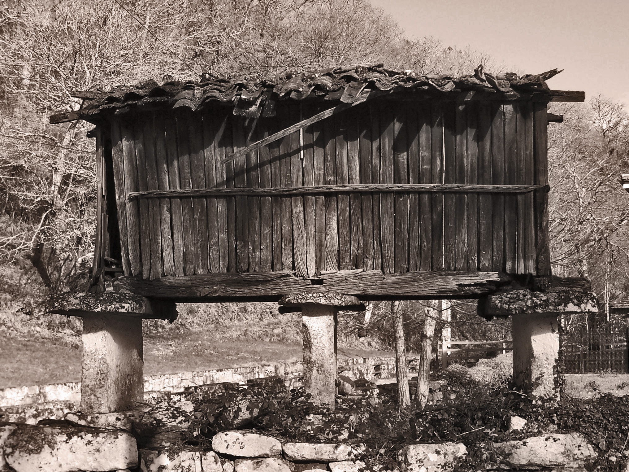 Cabazo, Oseira, San Cristovo de Cea, Galiza